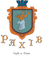 Герб міста Рахів